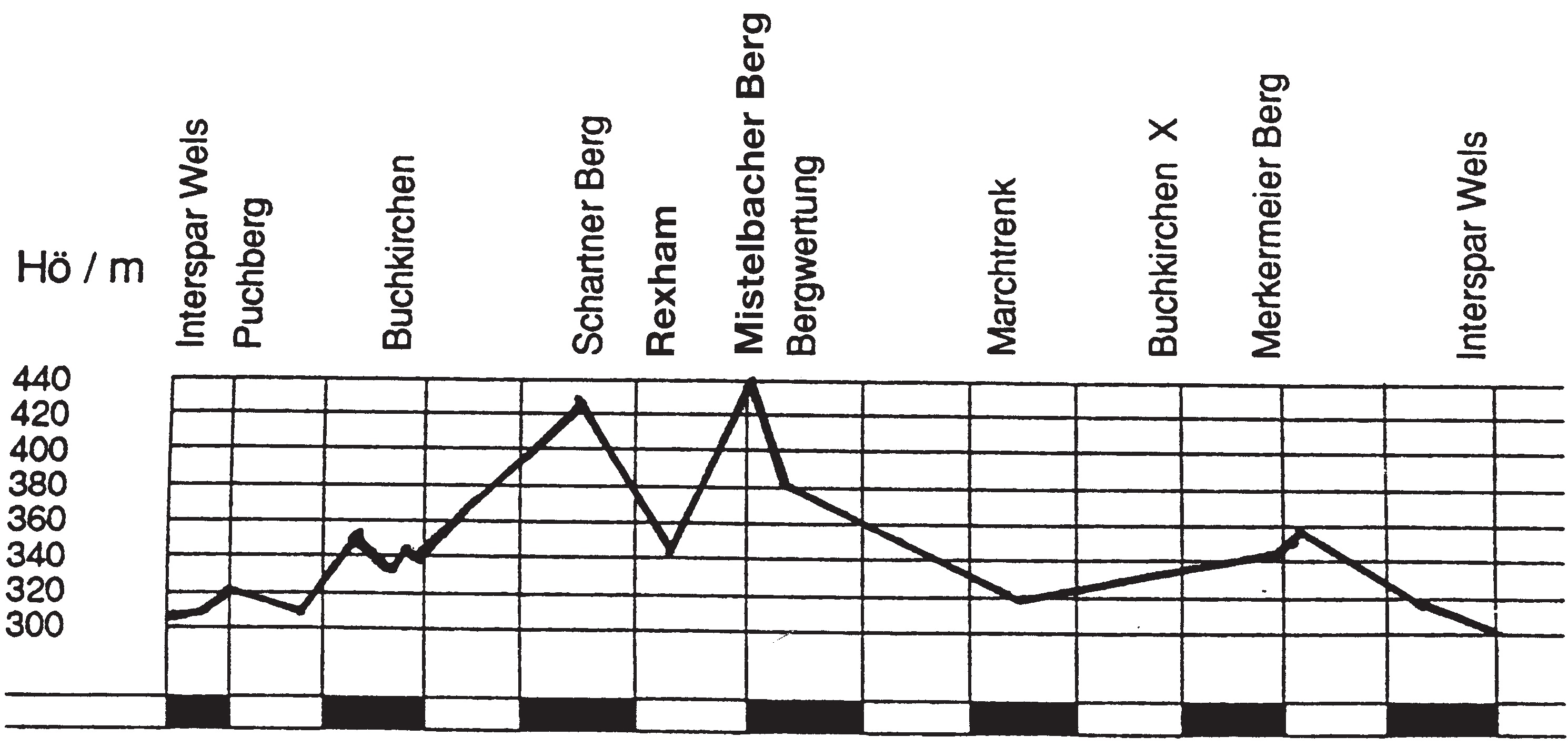 Höhenprofil einer (großen) Runde, Kirschblütenrennen